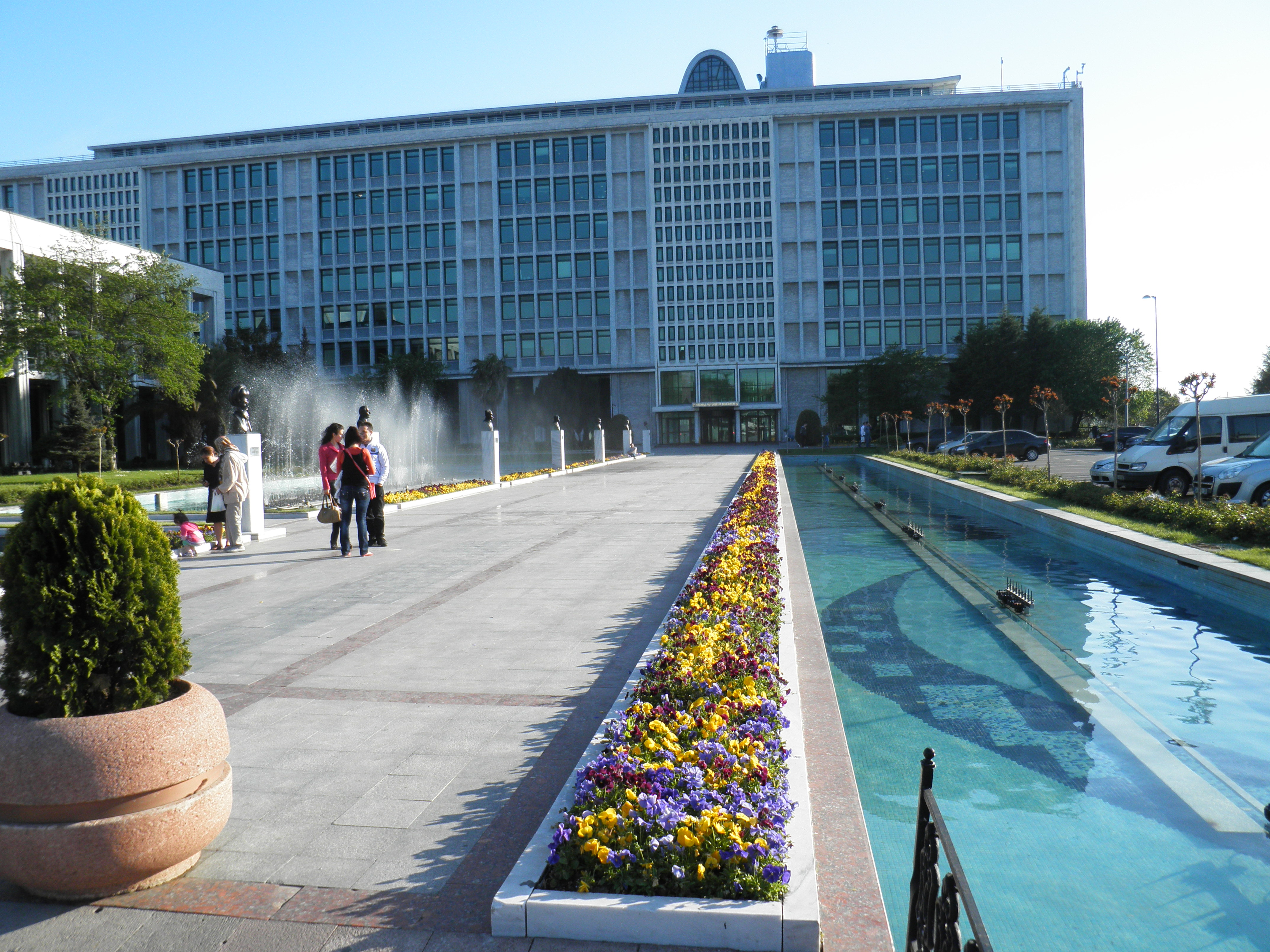 Istanbul Buyuksehir Belediyesi